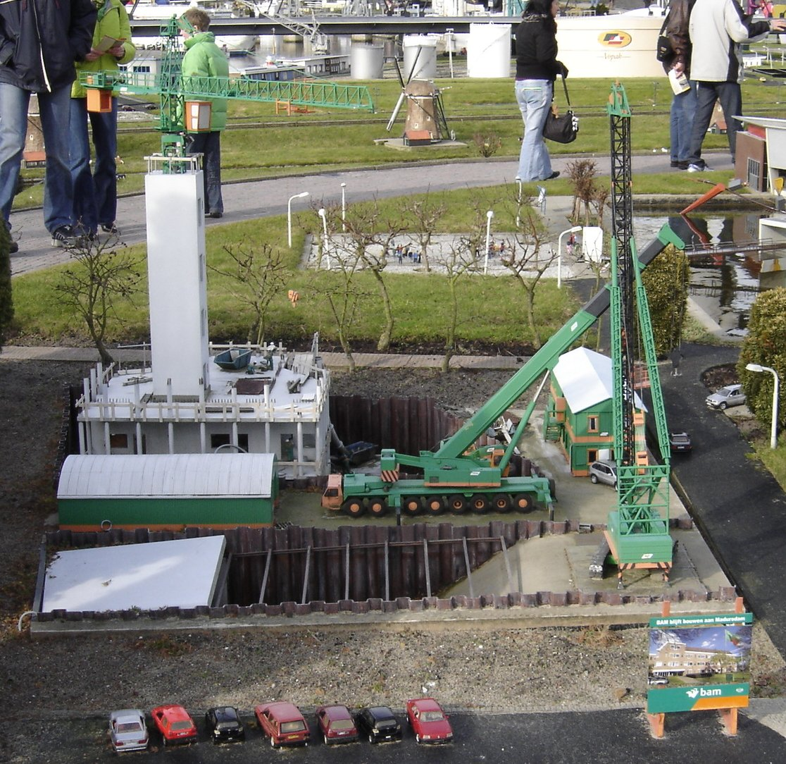 BAM groep bouwt een Metro, Madurodam, February 19, 2006